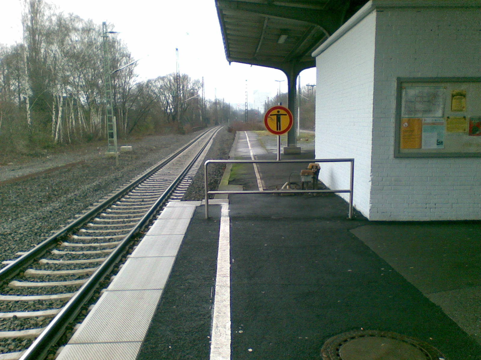 Bahnhof Wattenscheid - Gleis 1 (Richtung Bochum)